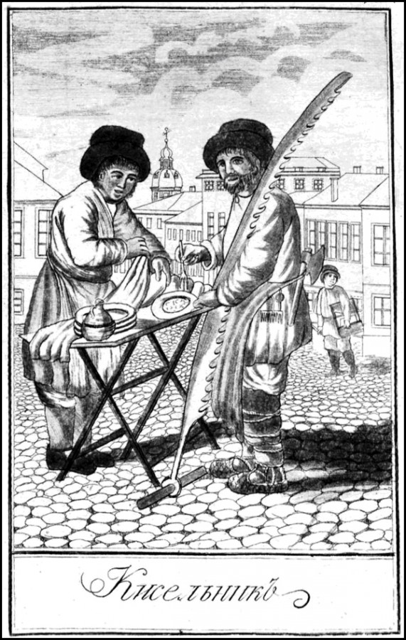 Кисельник — продавец твёрдого русского киселя. Из книги: Яков Иванович Басин «Национальныя изображения промышленников, снятыя с натуры в Санктпетербурге Издана Я.Б.». Издано в Санкт-Петербурге в 1795 г. Рис. Х. Г. Г. Гейслера.